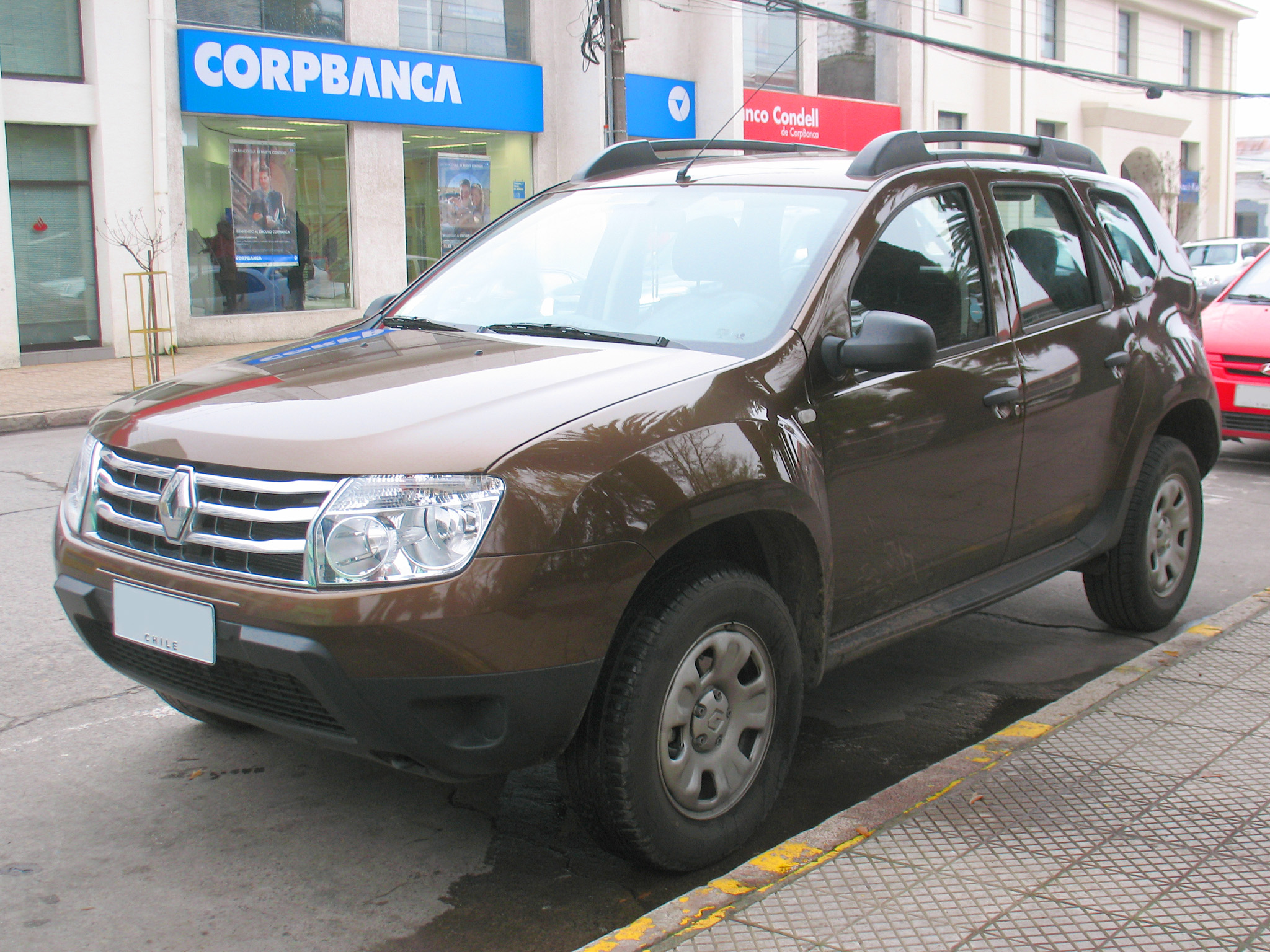 Renault Duster 1.6 Expression 2013